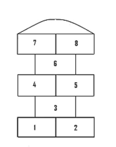 Sicilianu: Disegnu di lu jocu dò "sciancateddu" ca ci vogghiu mettiri nta l'articulu.-Stu disegnu è fattu di mia e picciò nun è suggettu a copyright.